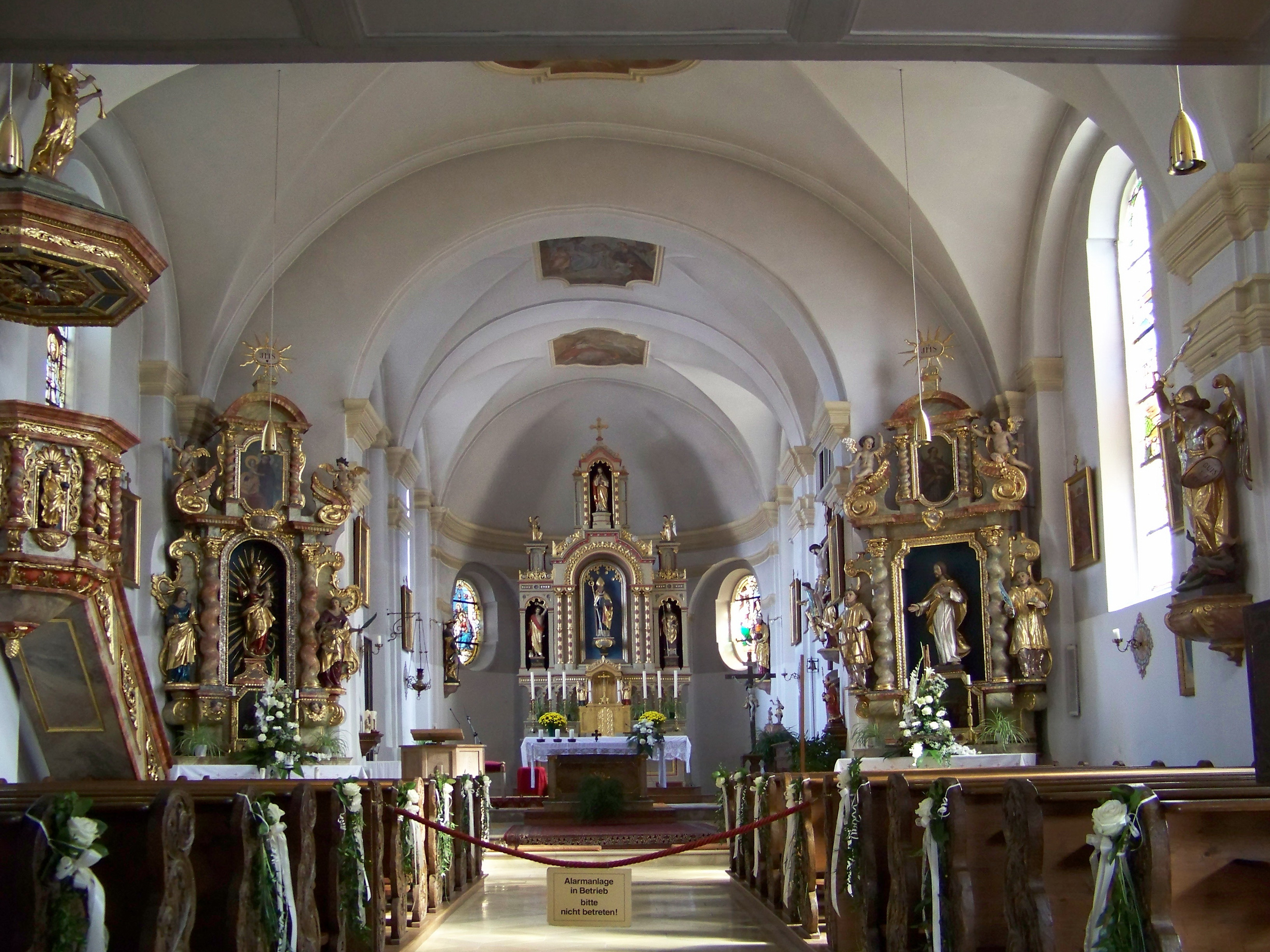 Weihmichl, Hauptstraße 24. Pfarrkirche St. Willibald. Saalkirche mit eingezogenem Chor, Langhaus und Chor barock, 1725/30. Langhaus mit drei Fensterachsen. Chor eingezogen mit zwei Jochen und Halbkreisschluss. Tonnengewölbe mit Stichkappen auf Pilastern.